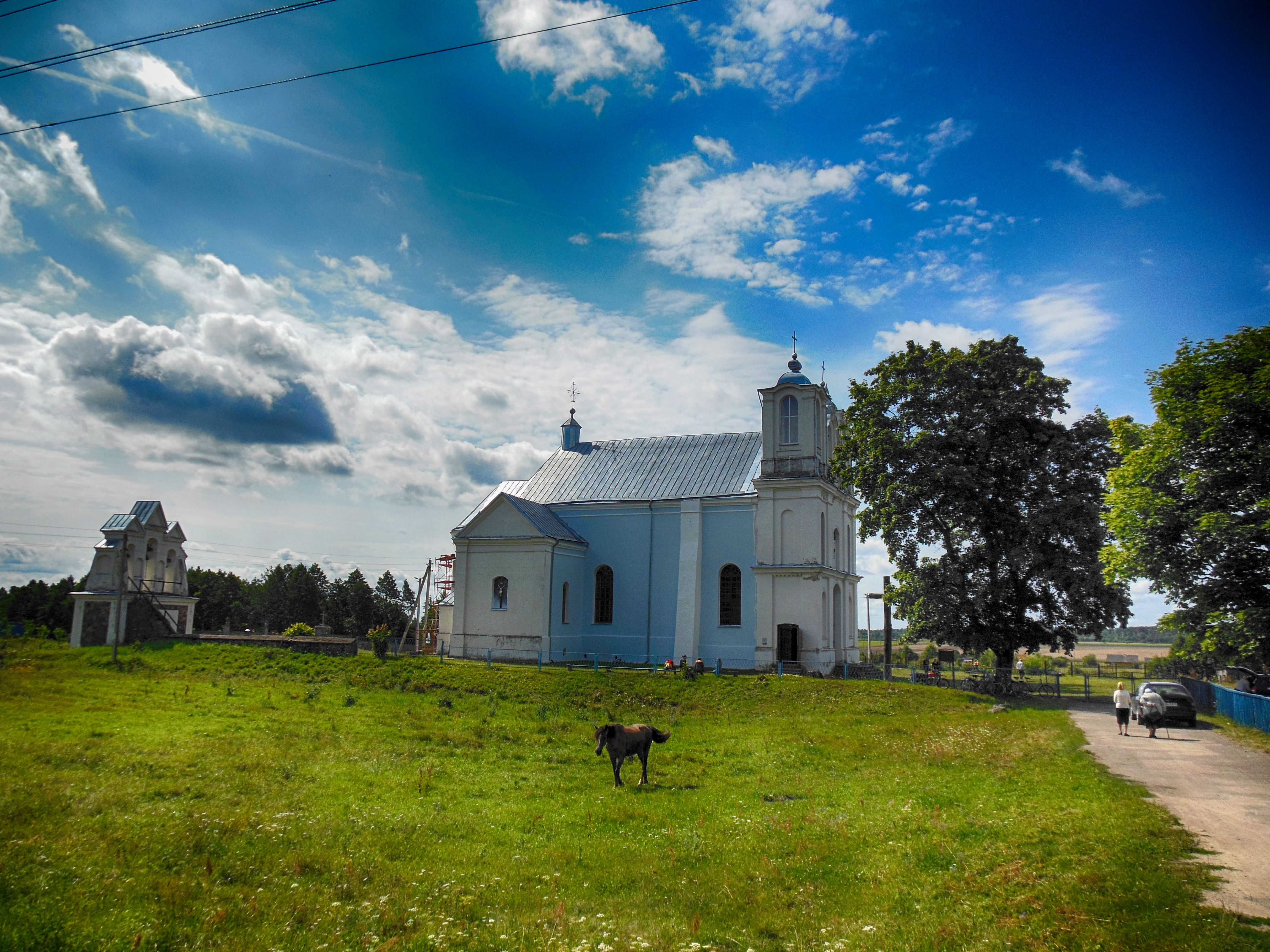 Беларуская (тарашкевіца): Касьцёл Марыі з брамай-званіцай і агароджай; дэкаратыўнае аздабленьне інтэр’еру касьцёлу — галоўны і два бакавыя алтары, дзьверы, лавы ў алтары. в. Вішнева This is a photo of Belarusian heritage monument. Reference number: 612Г000082 ( WLM)